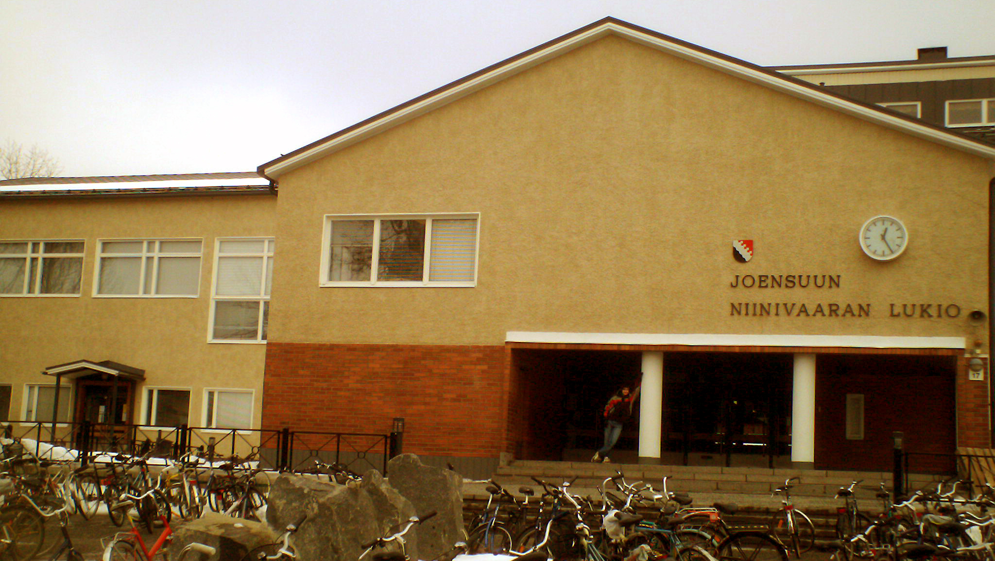 Joensuun Niinivaaran lukio